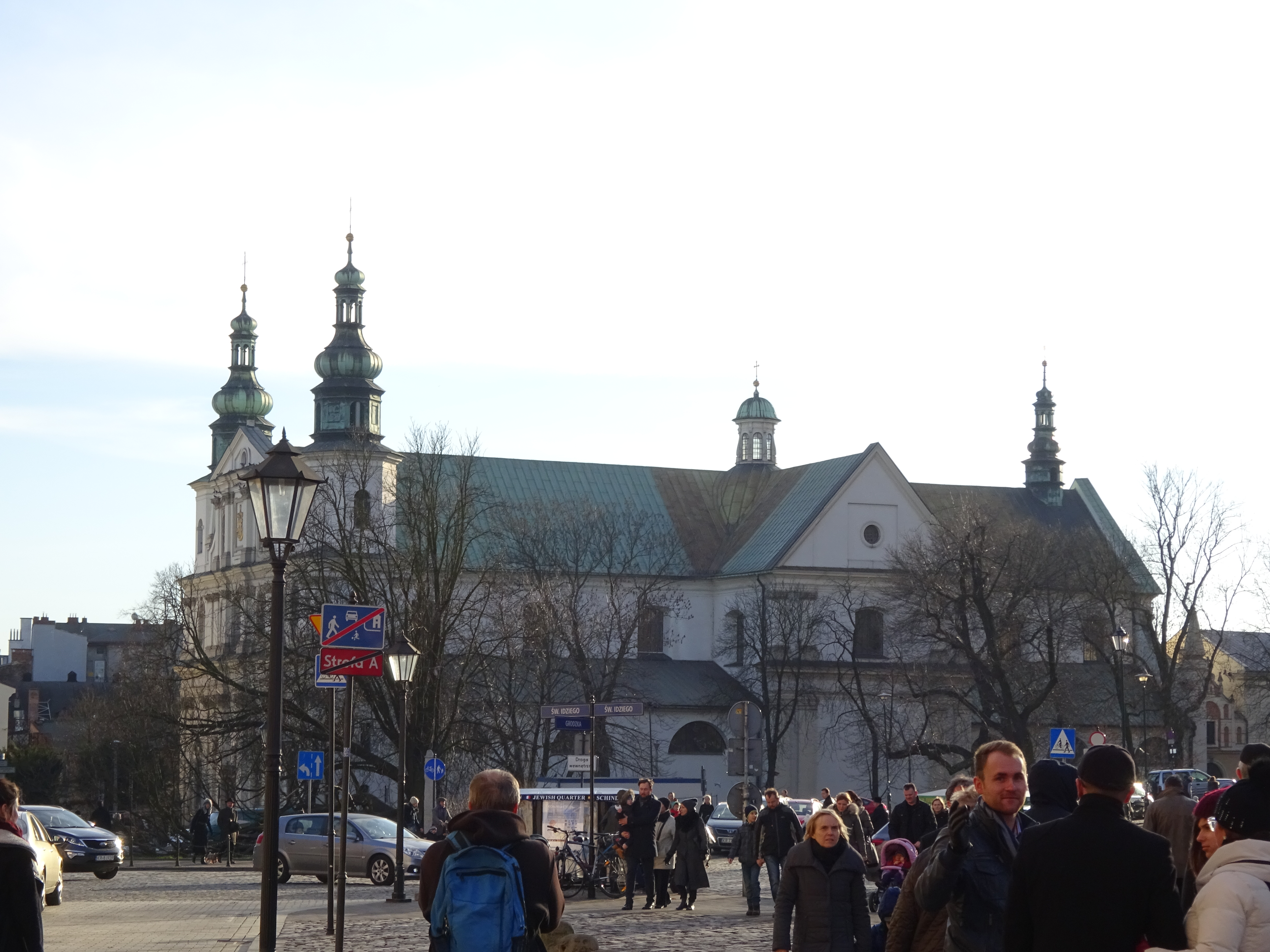 Kościół św. Bernardyna w Krakowie. Widok od strony ul. Grodzkiej.